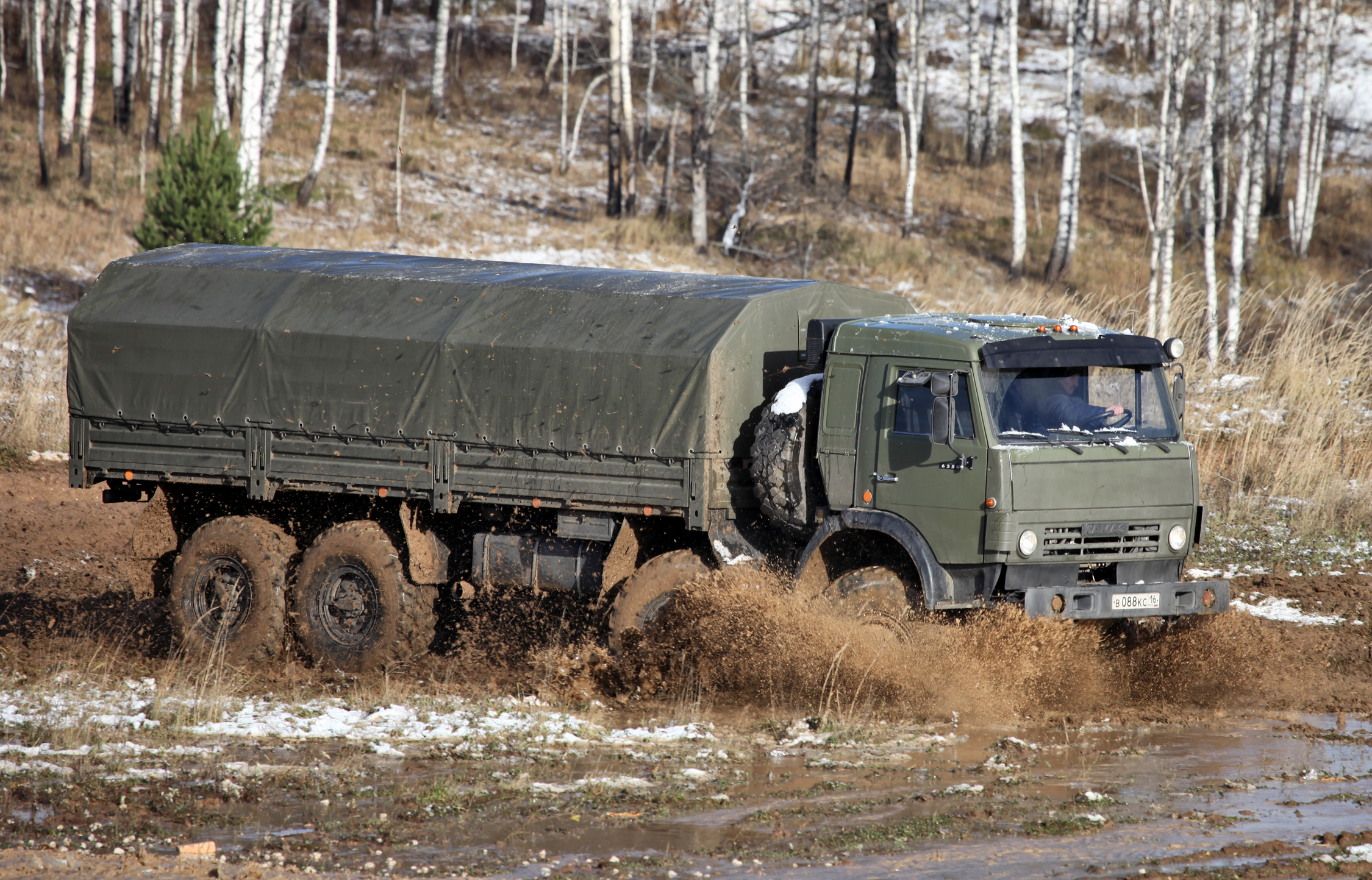 КАМАЗ-6350 (KAMAZ-6350)